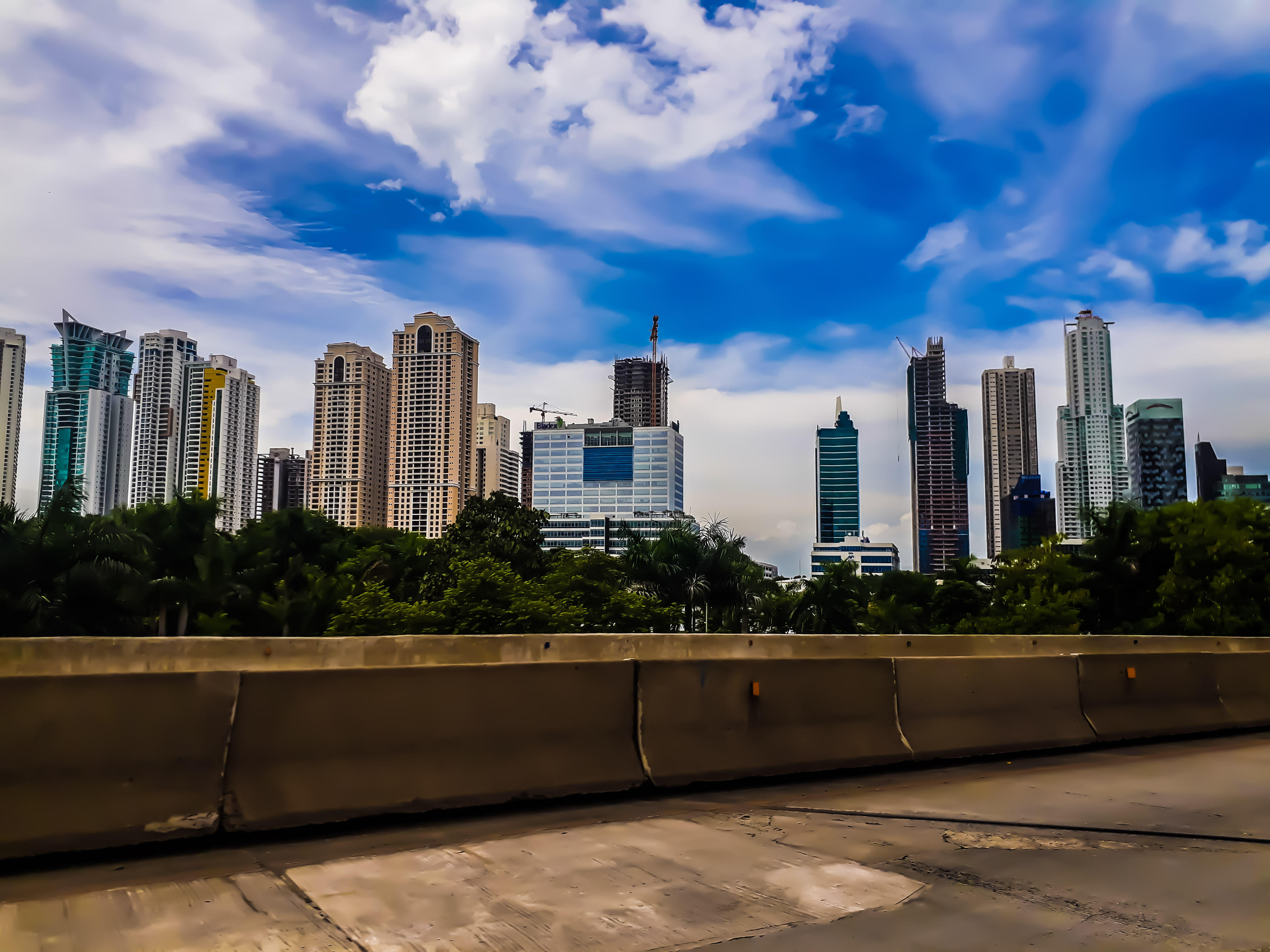 Panorama urbano Costa del Este (Panamá).